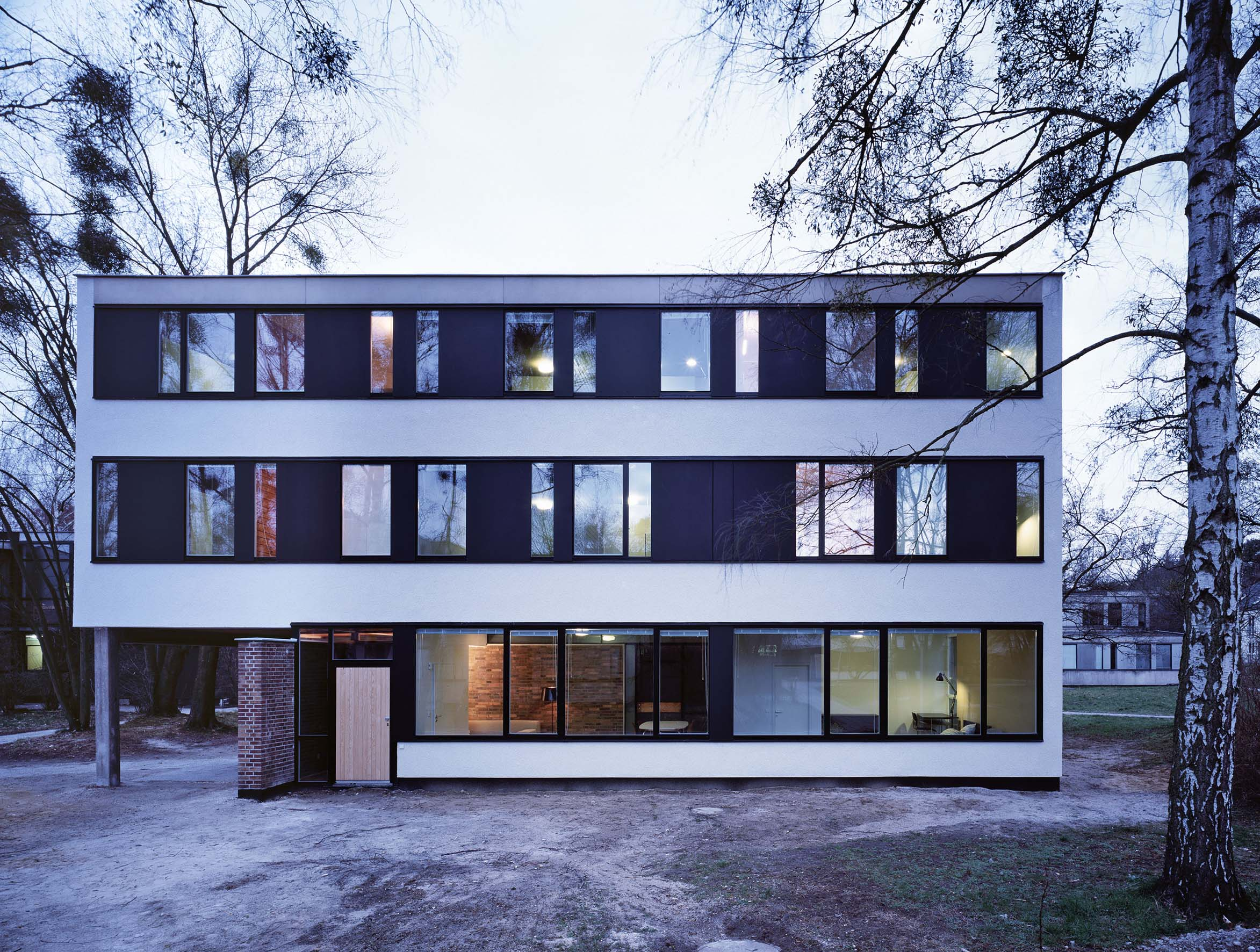 Studentendorf Schlachtensee, Berlin, Haus 4